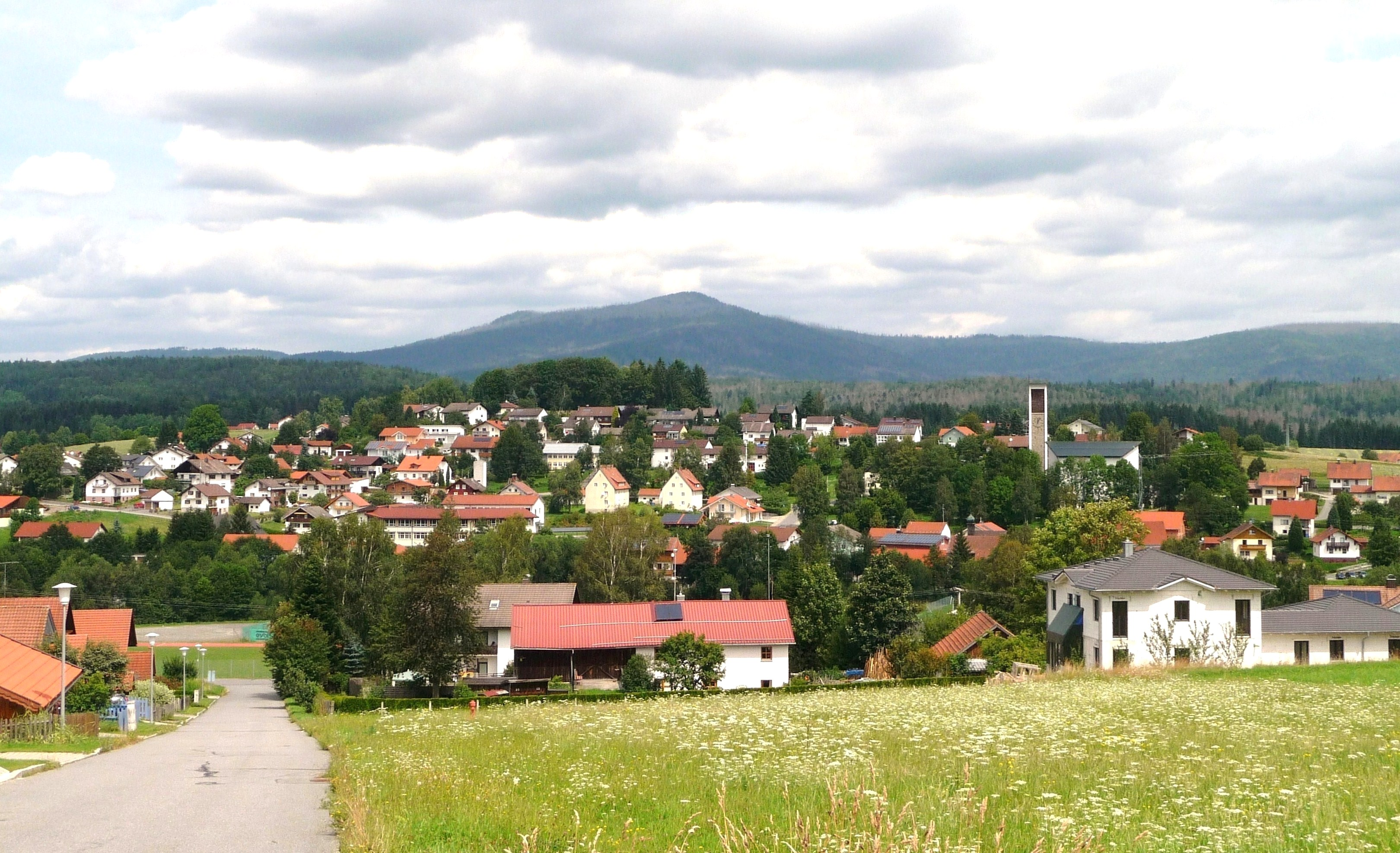 Blick auf Riedlhütte, im Hintergrund von links Kleiner Rachel, Großer Rachel und Plattenhausenriegel